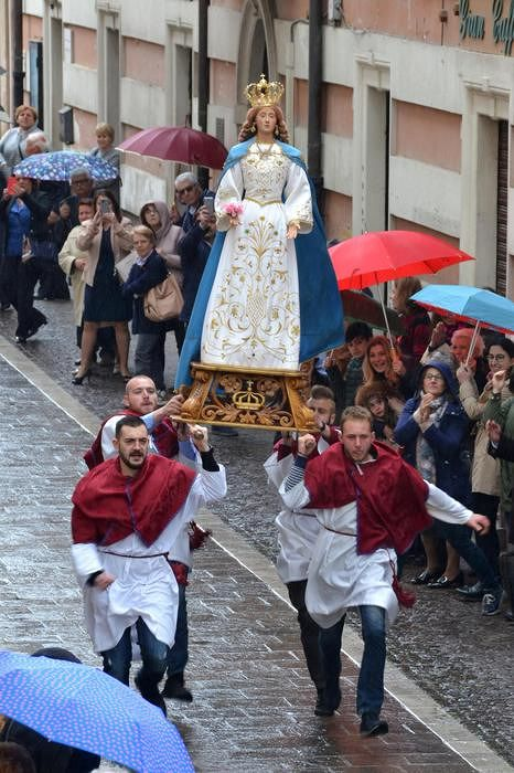 Madonna che vele, manifestazione tipica di Introdacqua